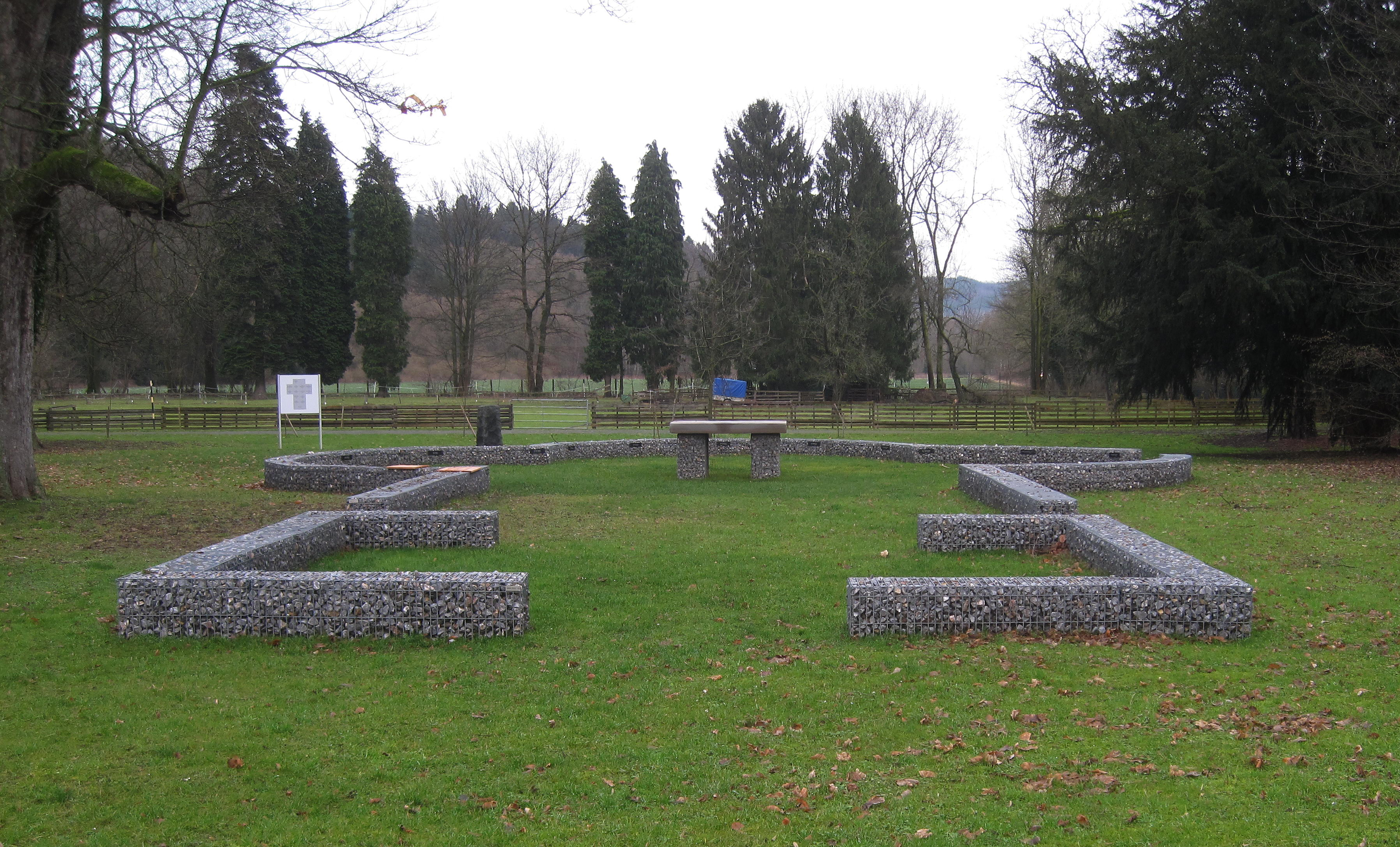 Nachbildung des Grundrisses der ehemaligen Vituskirche (1072-1818) im 12. Jahrhundert in Hemer.